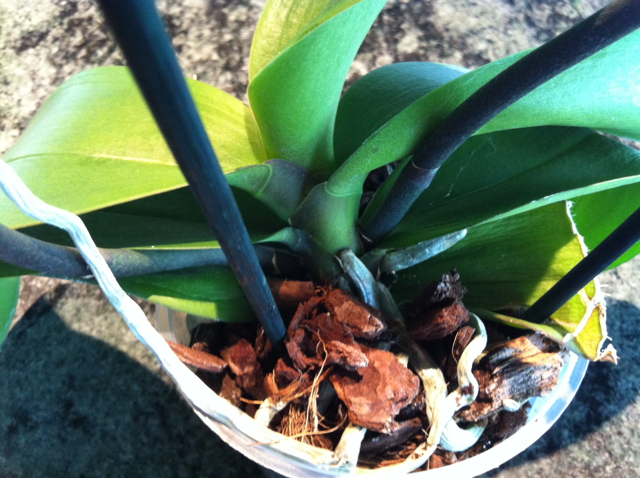 Lubje je uporabno tudi kot organska komponentna sestavina substrata za sajenje orhidej. Ima dobre lastnosti zadrževanja vlage ter omogoča dostop zraka do korenin orhideje.